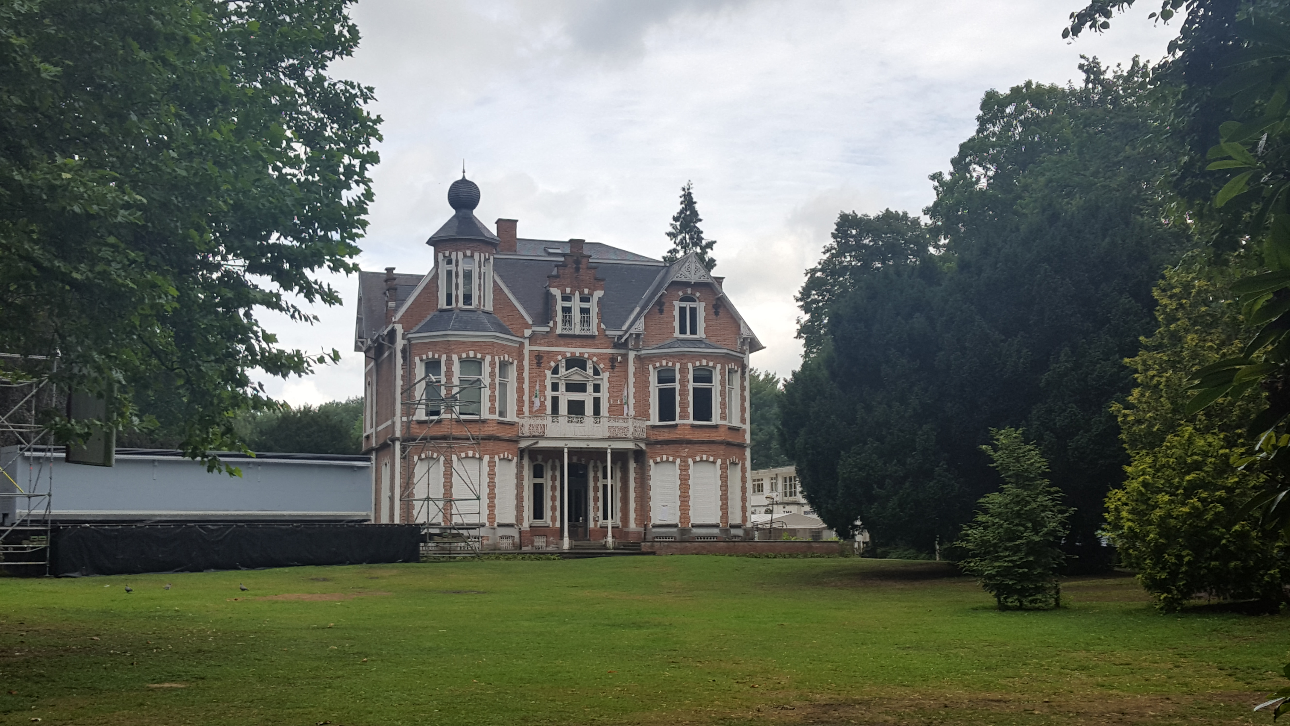 Landhuis Oaklands in Heldenpark, Eeklo, België